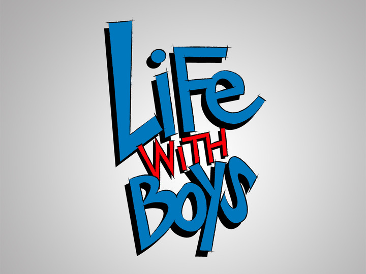 Logo Life With Boys